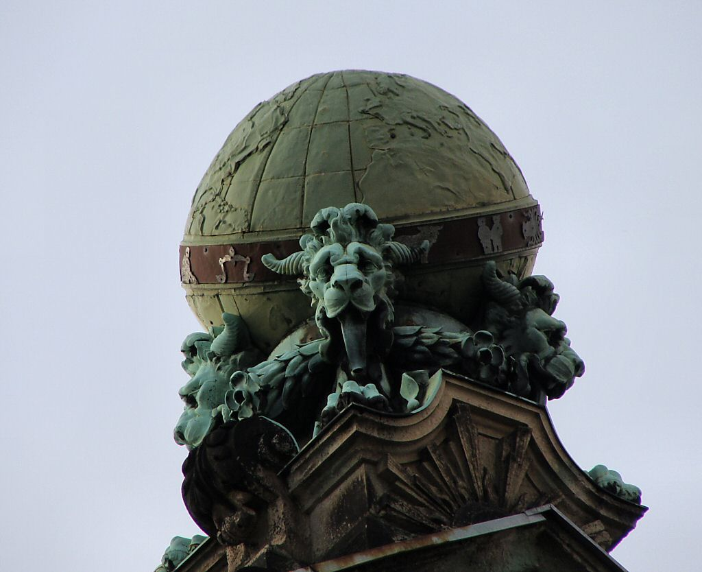 Szczecin Plac Orła Białego 2 - Pałac pod Globusem, 1723 (globus wieńczący budowlę)